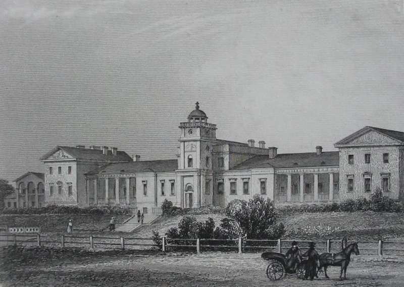 Больница Всех Скорбящих Радости (бывшая дача Сиверса)